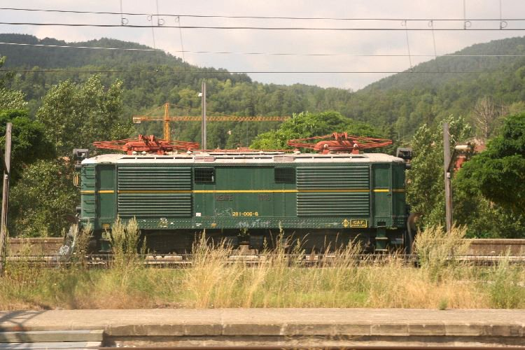 Renfe Serie 281 en estación indeterminada poco antes de llegar a Ribes de Freser.